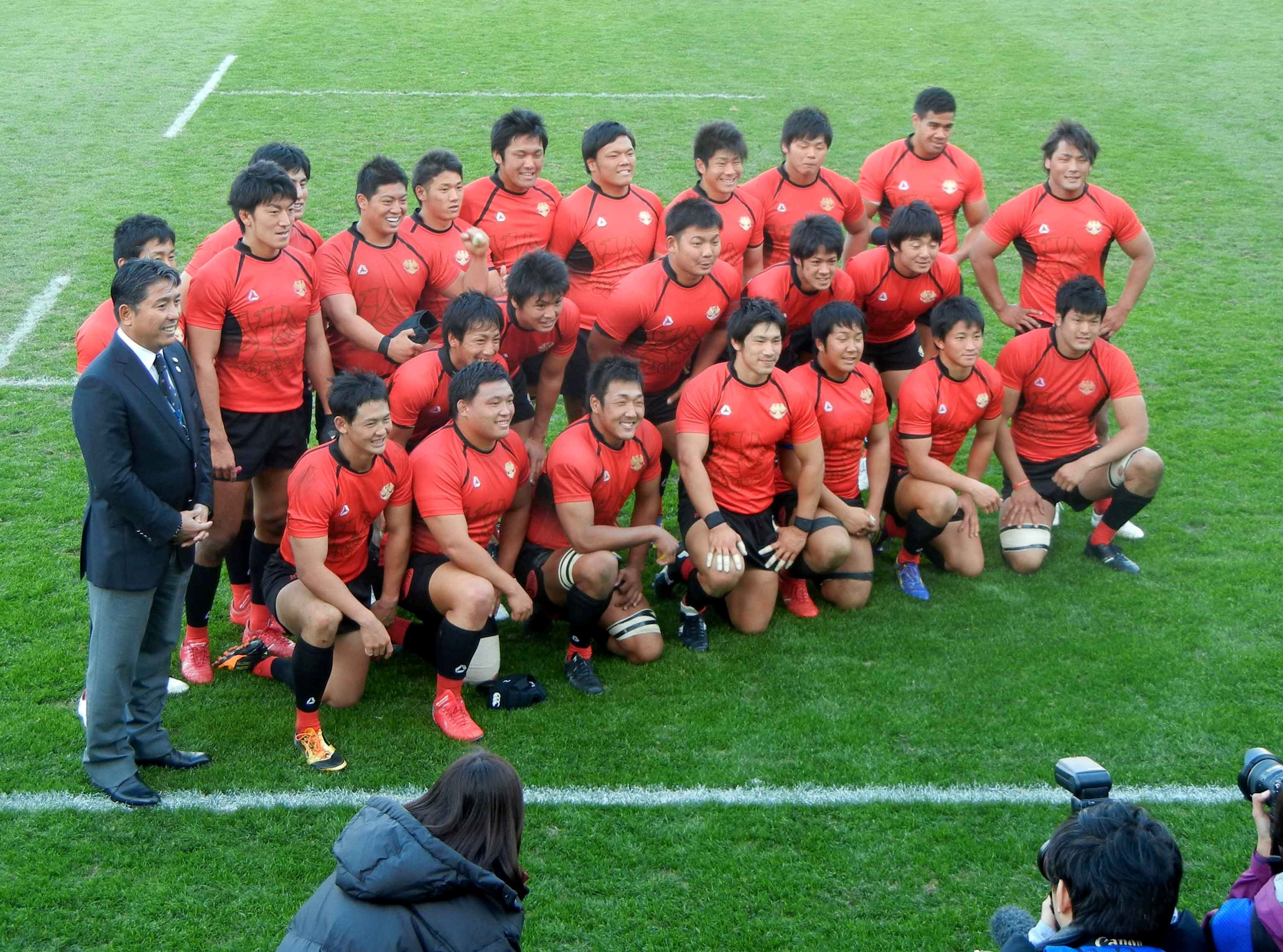 2013年度関東大学対抗戦 帝京大学ラグビー部 優勝記念写真